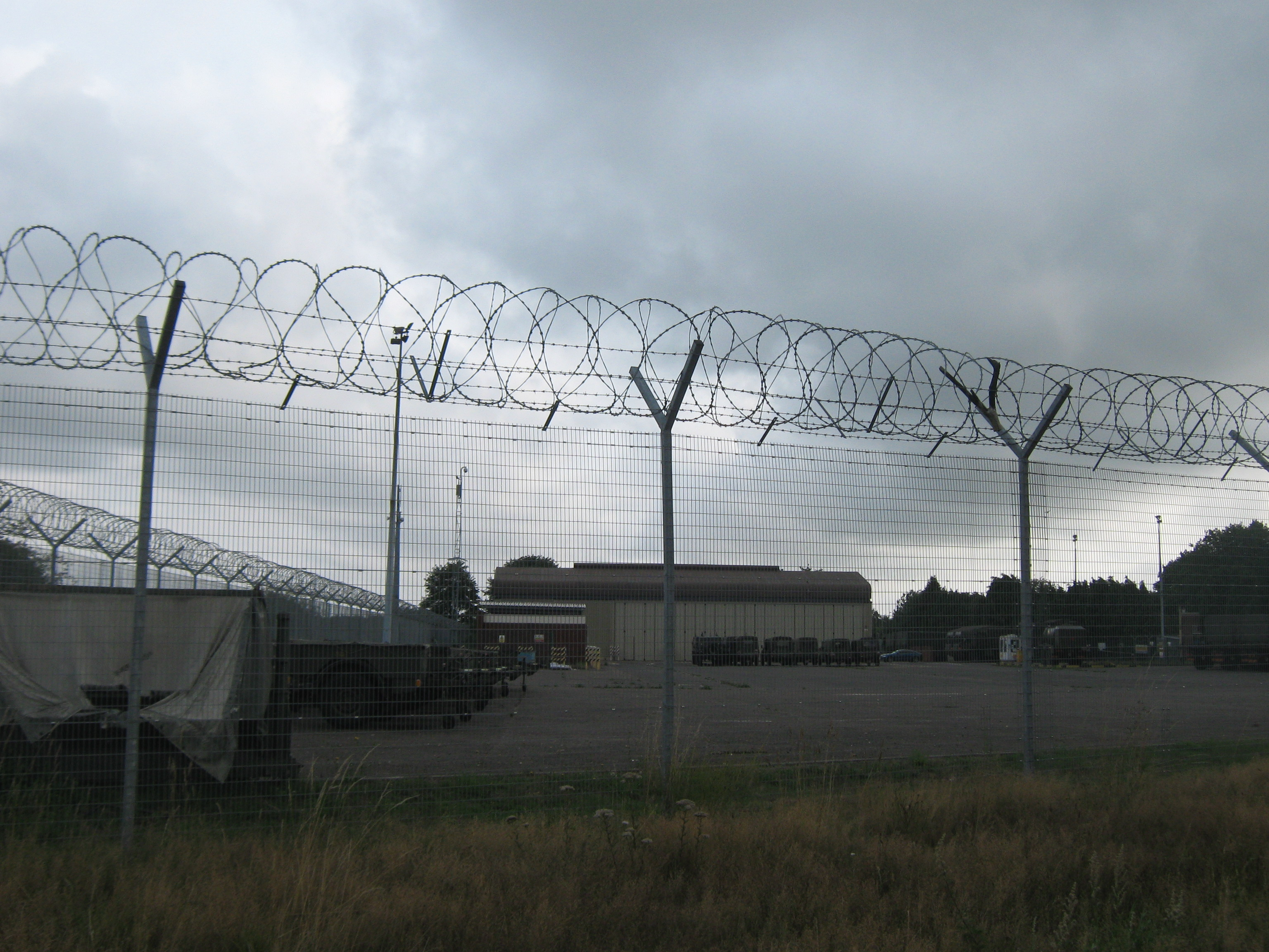 Howe Barracks